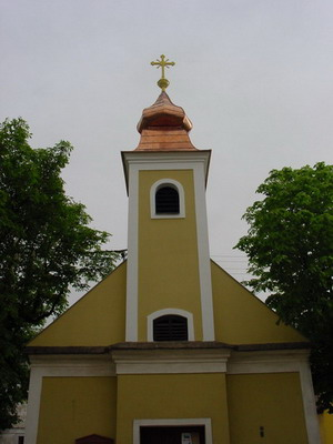 Ortskapelle hl. Sebastian, Kollersdorf